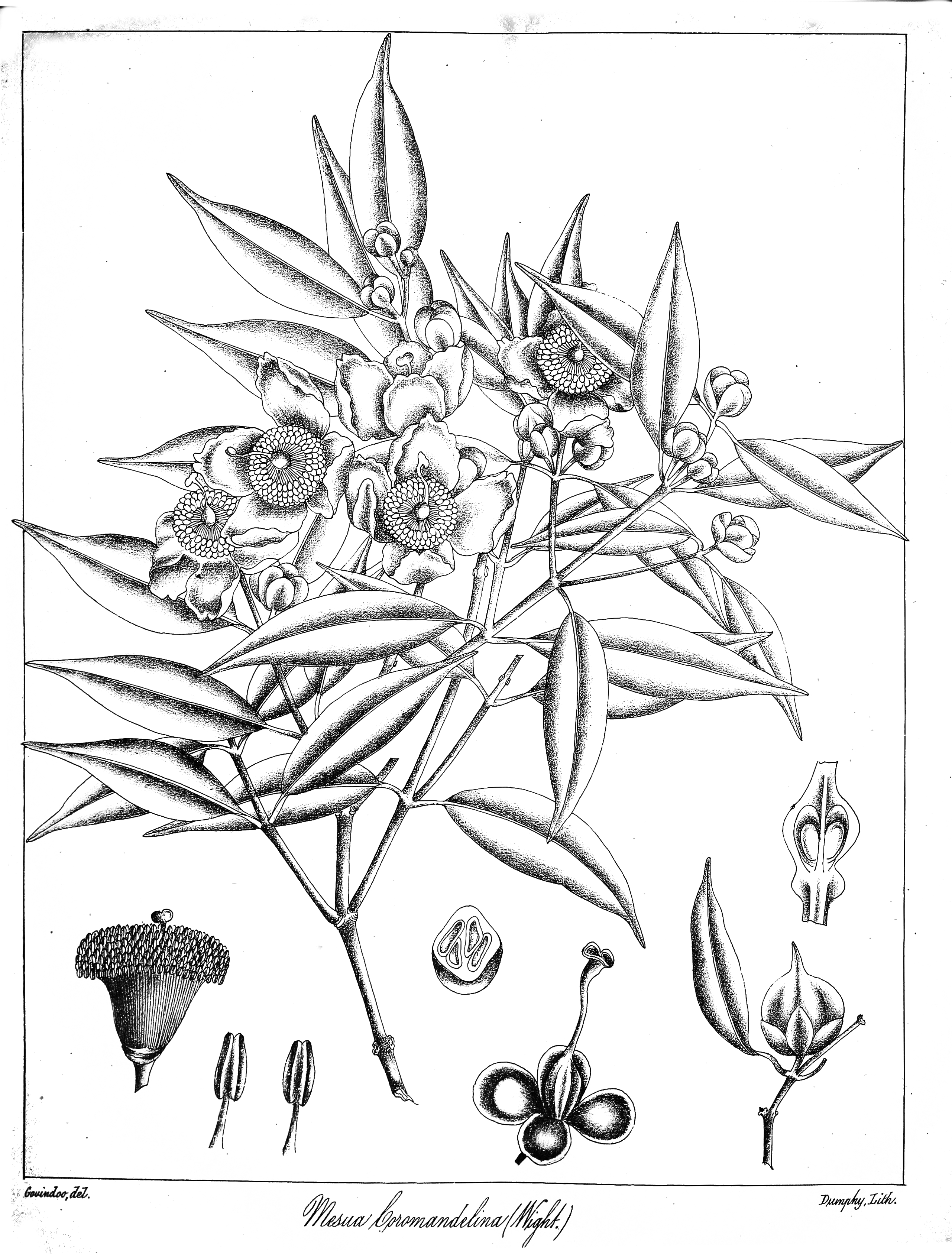 Mesua ferrea var. coromandeliana